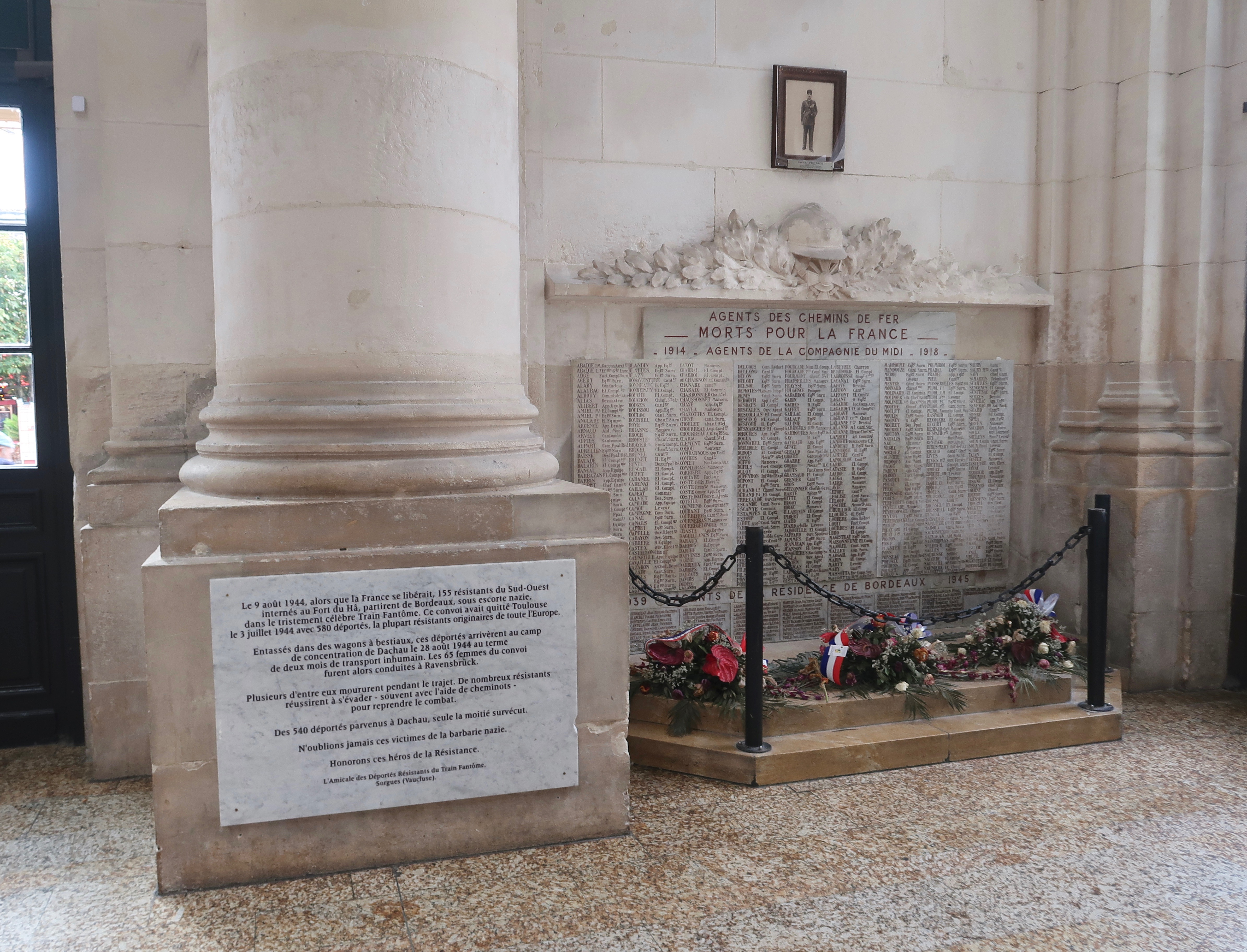 Monument aux morts de la Première Guerre mondiale (droite, surmontée d'une photo du résistant Charles Domercq) et d'une plaque à gauche en hommage aux victimes du "Train fantôme" de la Seconde Guerre mondiale). En gare de Bordeaux-Saint-Jean (Gironde), dans la partie nord-ouest du hall 1.